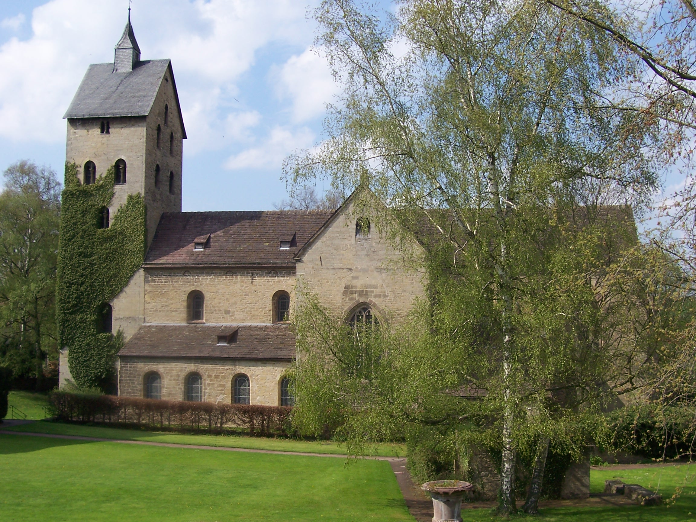 Brakel: Romanische Kirche Sankt Peter und Paul von 1182 in Gehrden, Kreis Höxter.